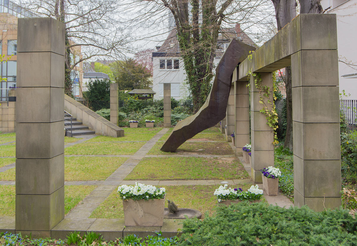 ehem. Landesvertretung Rheinland-Pfalz, Heussallee 18–24, Bonn: Blick in den Garten aus Süd-West mit Skulptur Raumplastik (1990) von Christoph Mancke